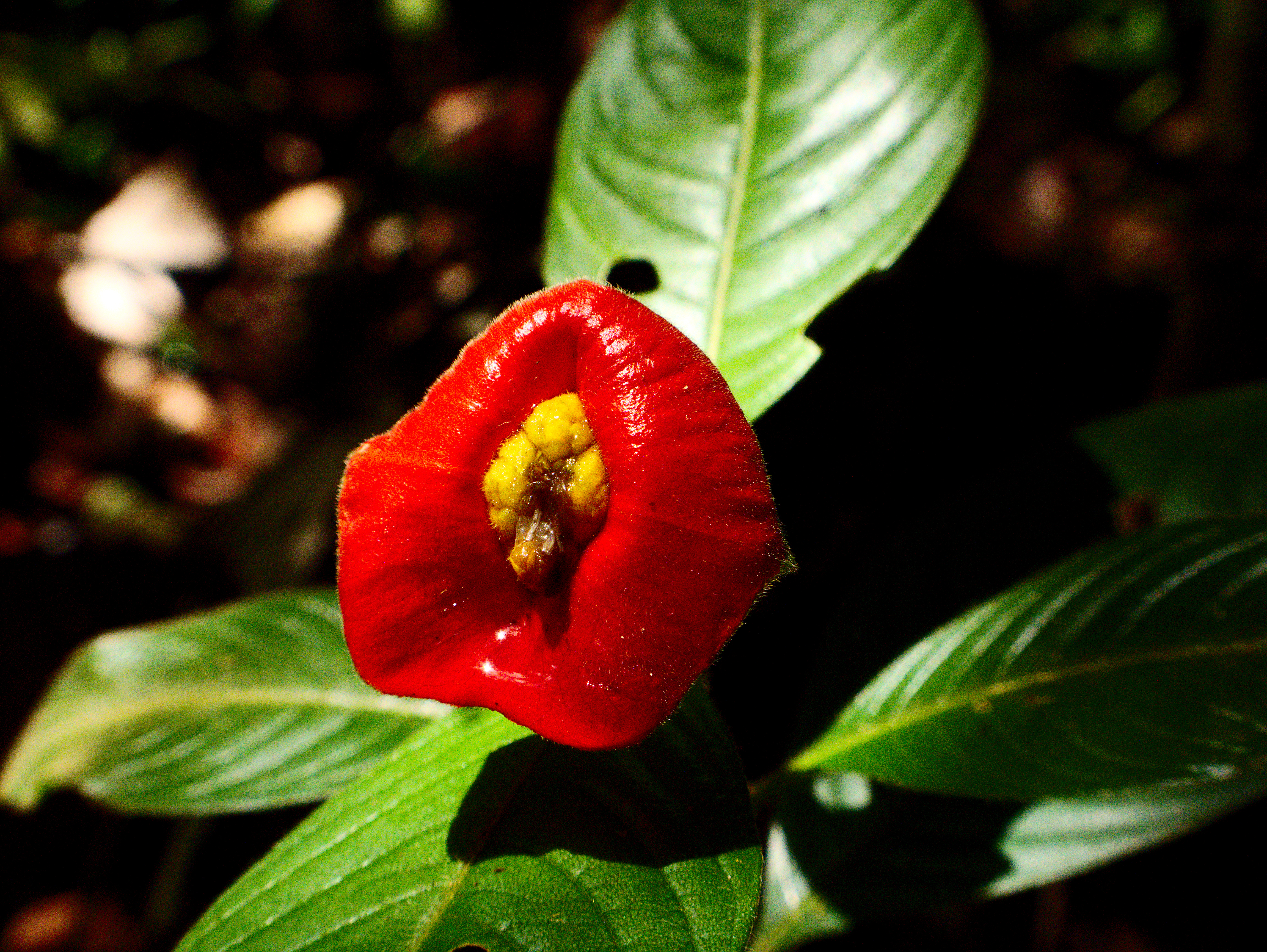 Psychotria Elata es llamada Labios de Mujer. Laguna Lachua, Alta Verapaz, Guatemala.